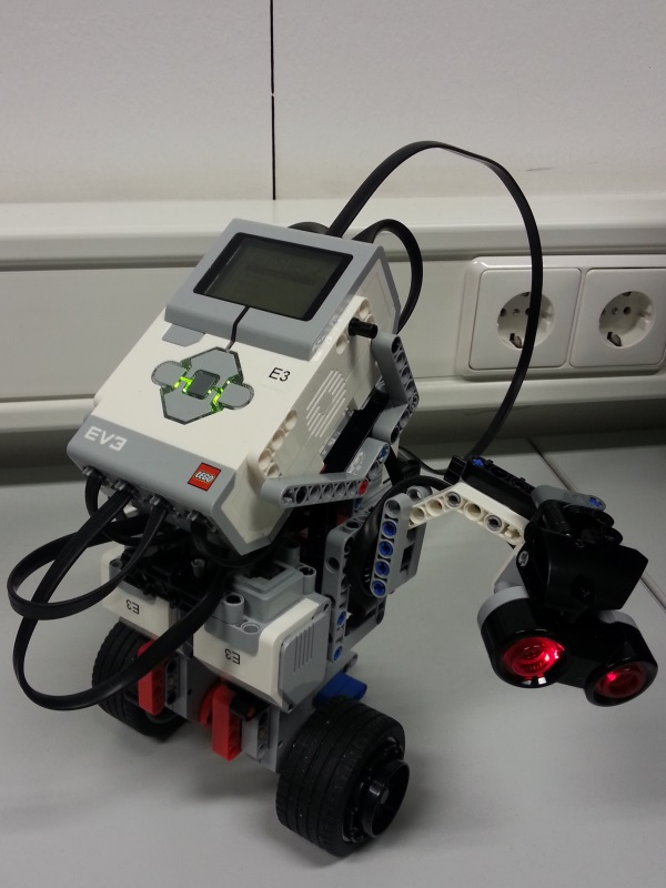 Tag 6: Gyro Boy